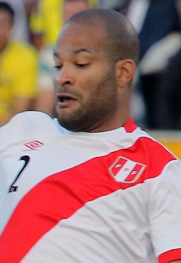 Quito 5 Sep (Andes).- Encuentro por eliminatorias Rusia 2018 entre Ecuador y Perú. Fotografías: Carlos Rodríguez/Andes.